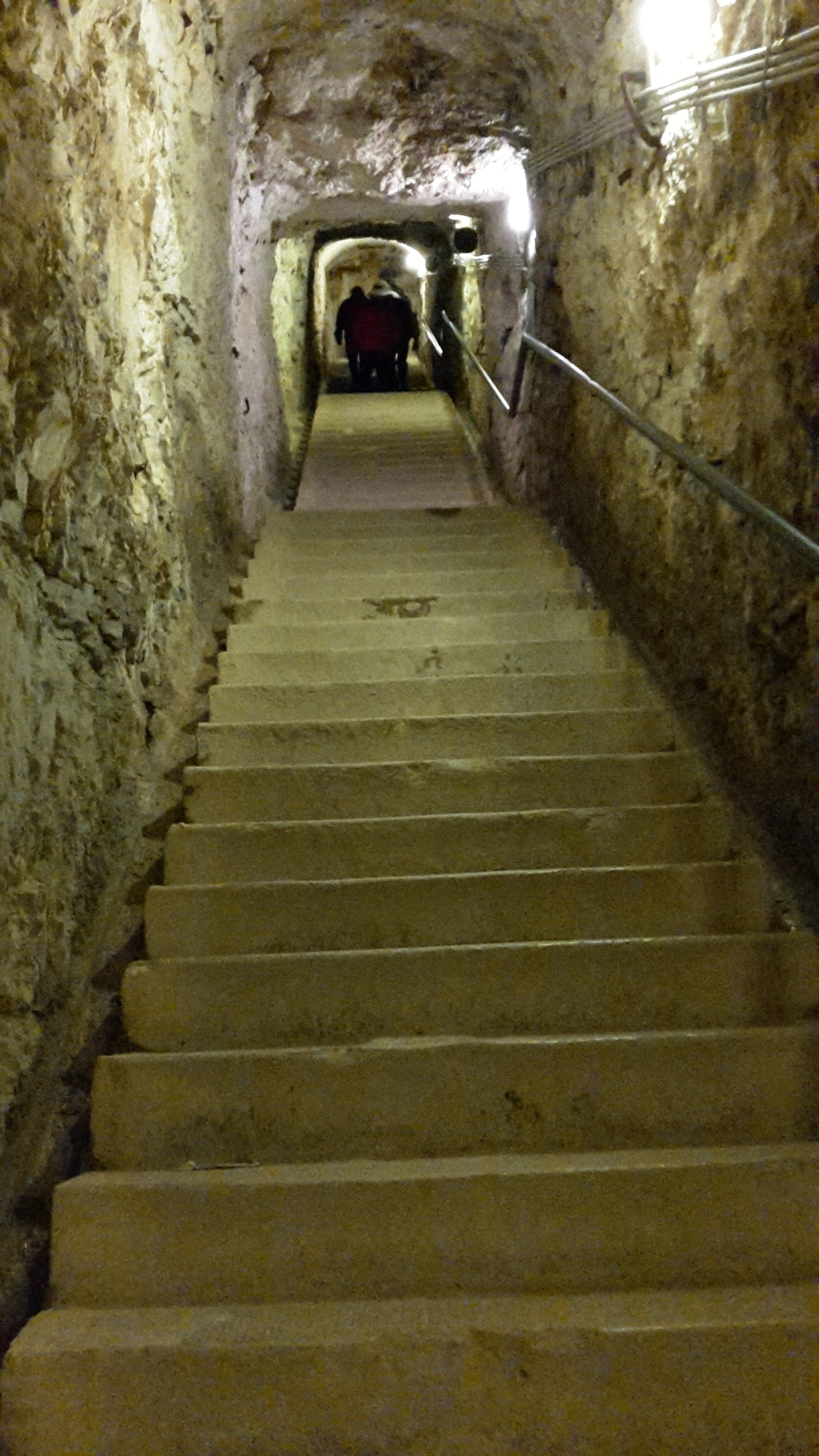 Forte Belvedere-Gschwendt